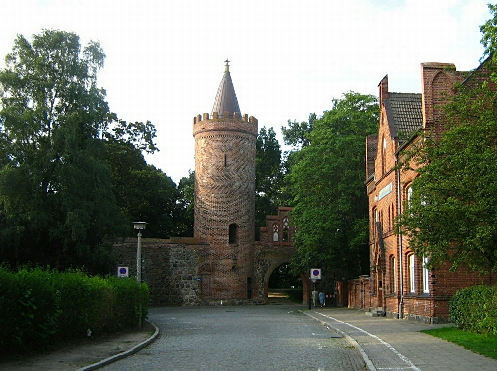 Der Mönchsturm (heute Fangelturm genannt). Das daneben befindliche Tor ist ein Bauwerk aus neuerer Zeit. In die Neubrandenburger Stadtmauer wurden ab dem 19. Jh., neben drei großen Durchbrüchen für Straßenführungen, mehrere kleine Durchgänge eingebaut. Der ursprüngliche Turm mit dem Namen "Fangelturm" befand sich am Ende der Turmstraße. Er stürzte 1899 ein.